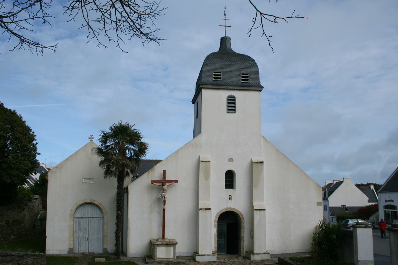 Eglise de Locmaria